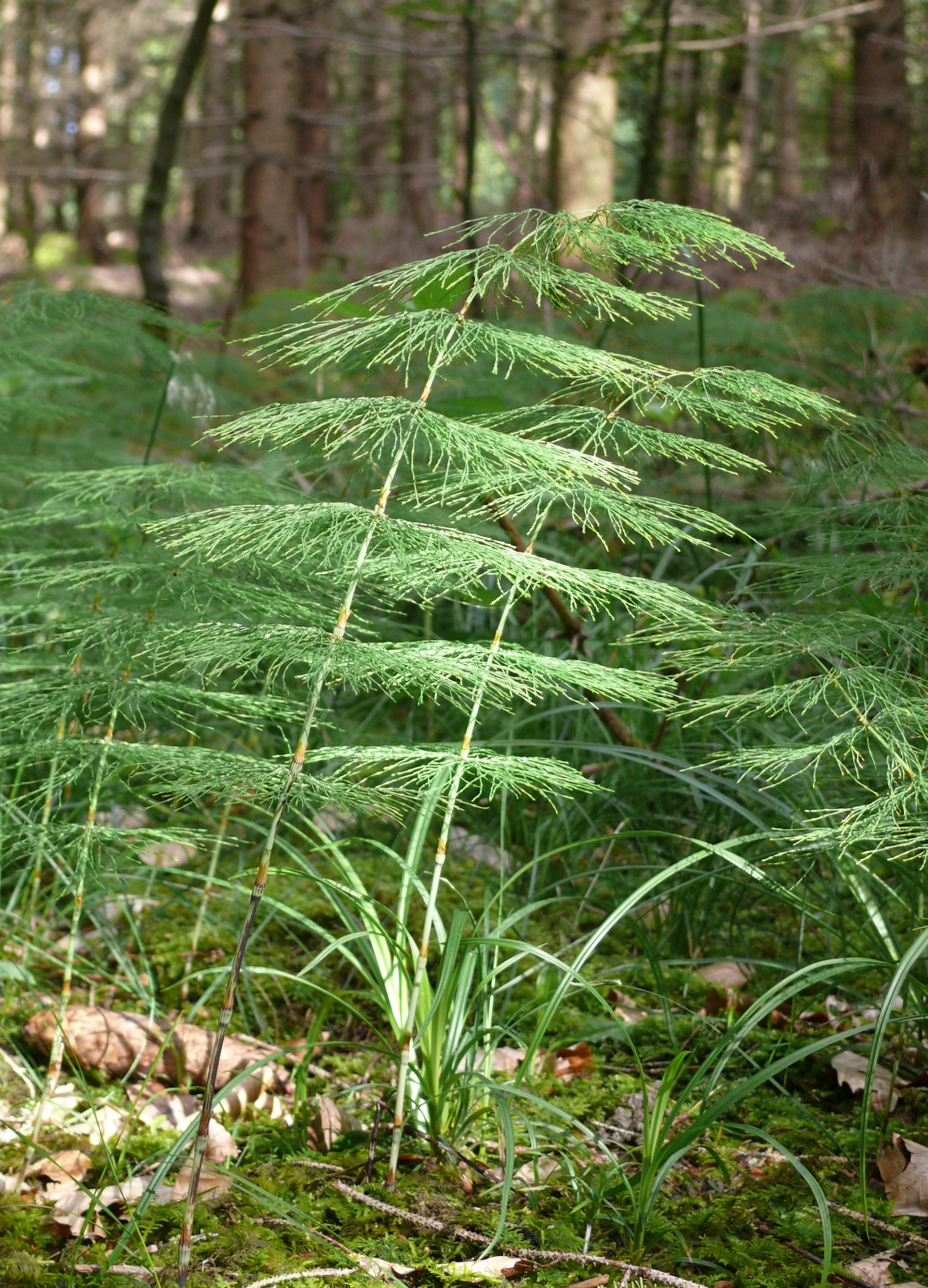 Equisetum sylvaticum, Schwäbisch-Fränkische Waldberge, Germany